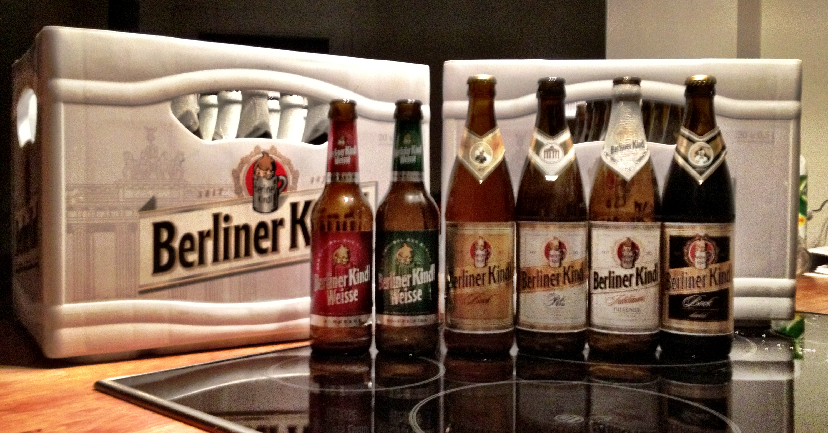 Seks forskellige øltyper fra Berliner Kindl.